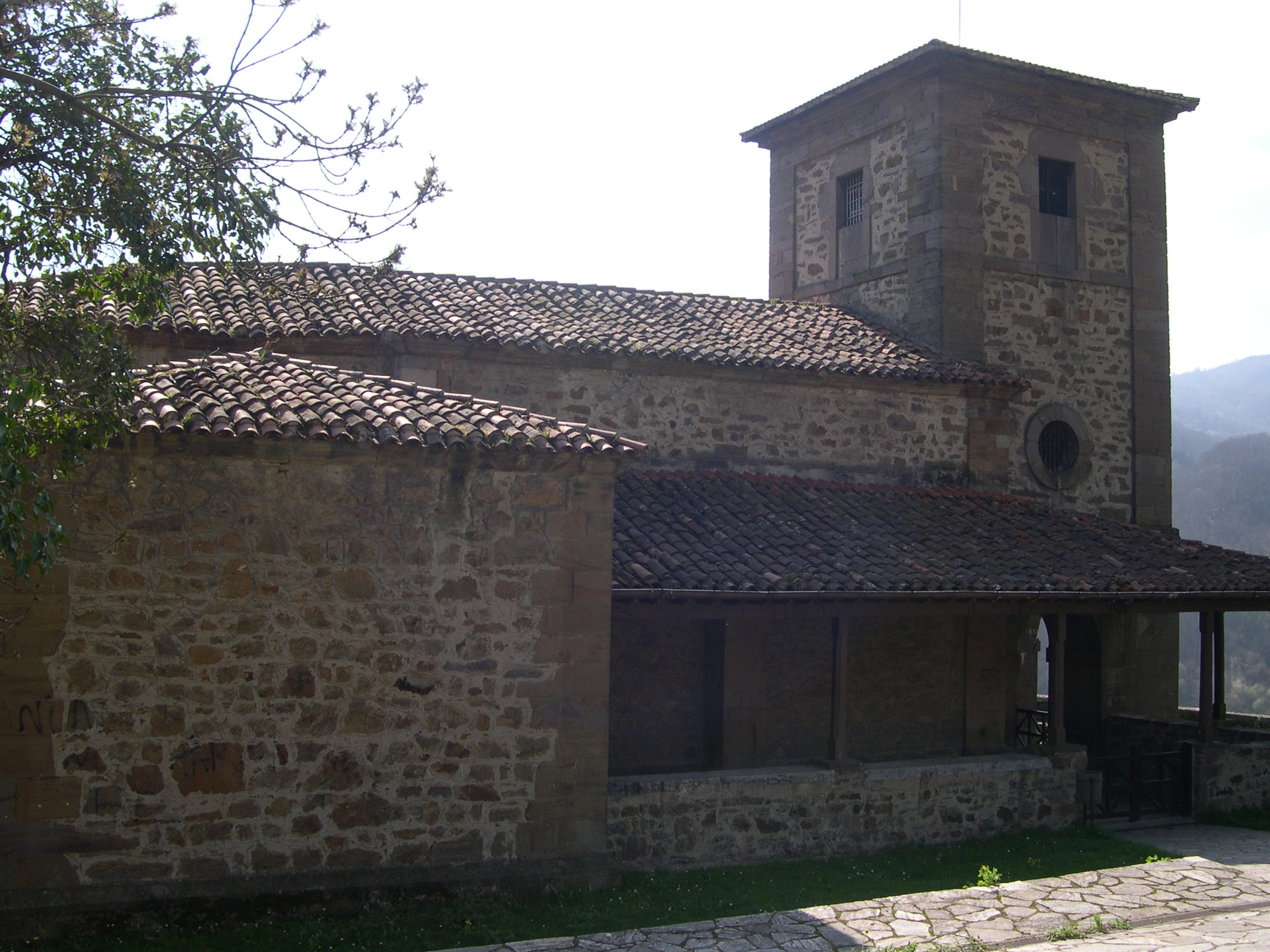 Santuariu de los mártires Cosme y Damián, na parroquia d'Insiertu, en Cuna, Mieres, Asturies. Ye del sieglu XVIII